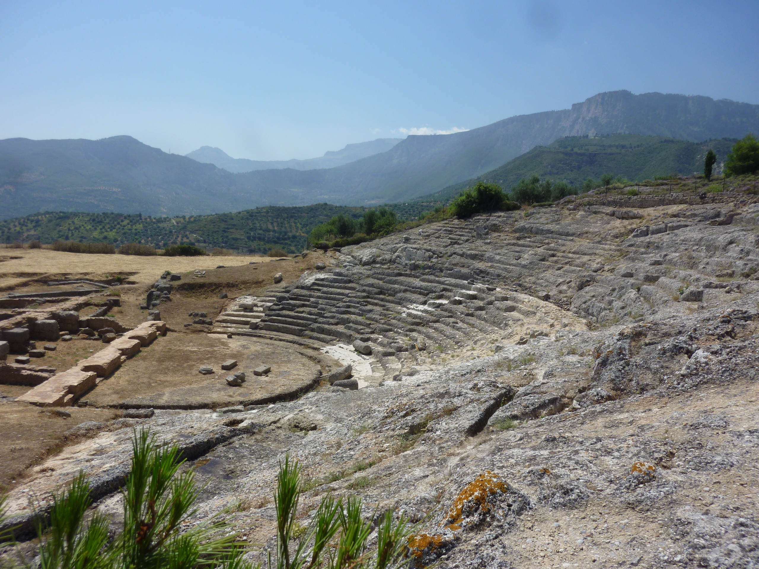 Théâtre antique d'Egira, Grèce